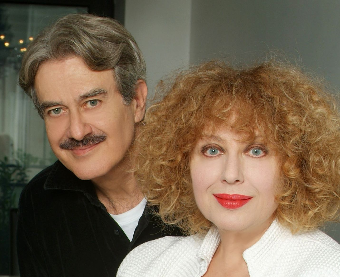 Foto da me scattata a Giuseppe Pambieri e Lia Tanzi.